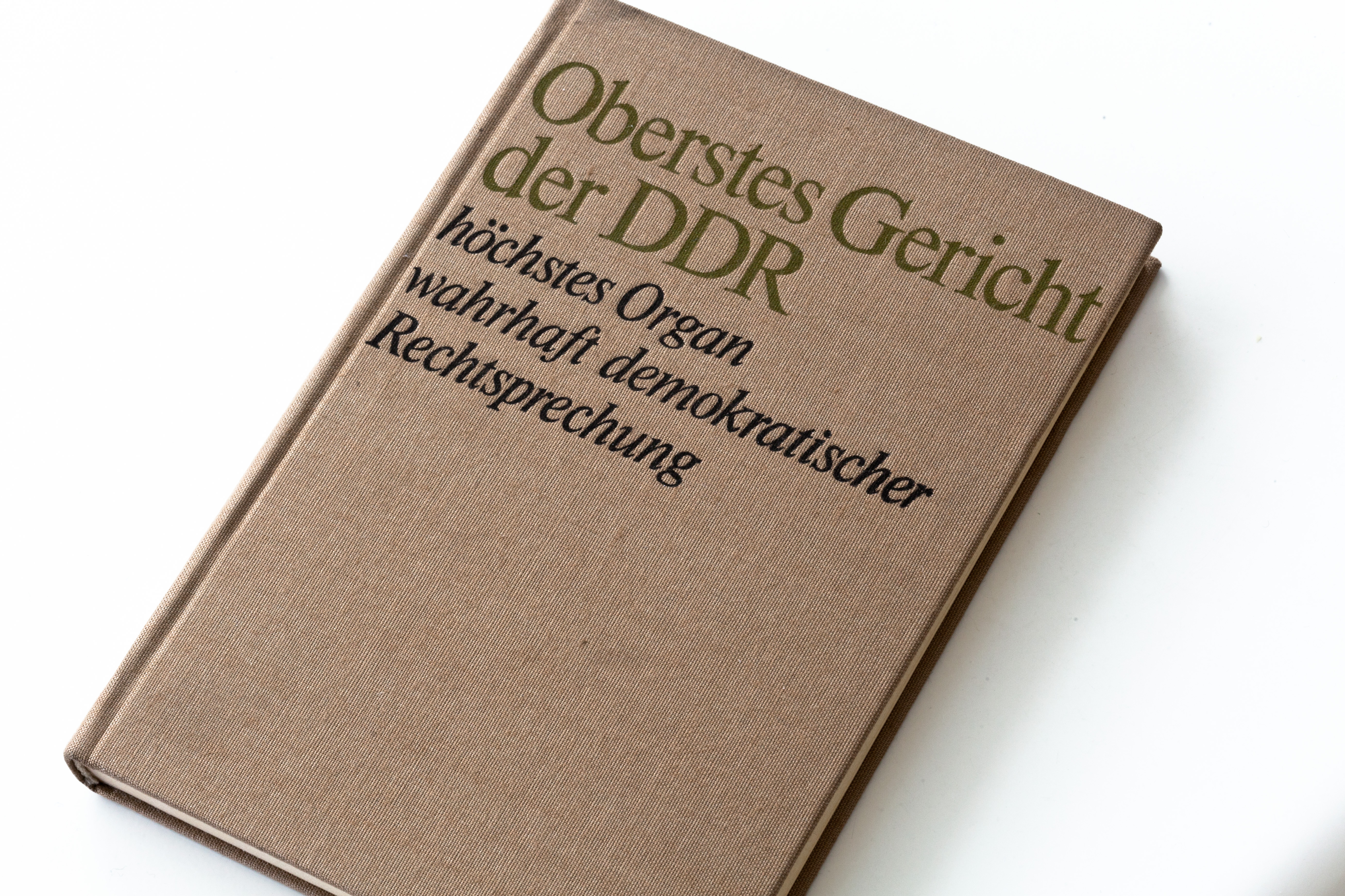 Buch-Umschlag der im Staatsverlag der DDR 1970 anlässlich des 20jährigen Bestehens erschienenen Textsammlung "Oberstes Gericht der DDR - höchstes Organ wahrhaft demokratischer Rechtsprechung"